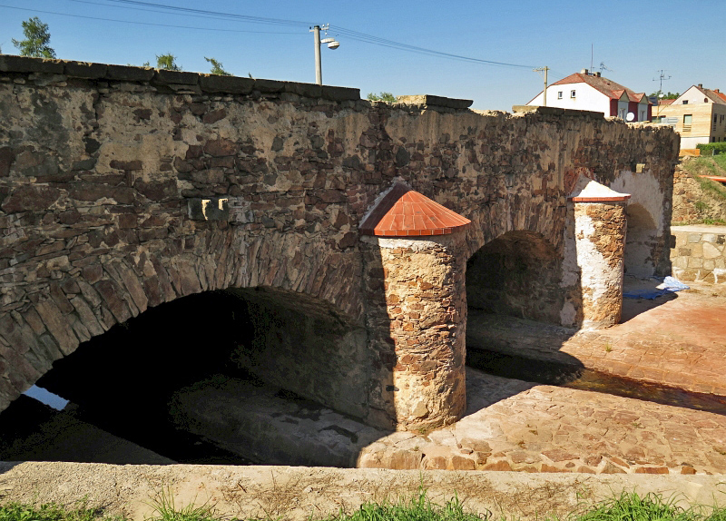 Silniční most, na hlavní silnici do Teplic, Lahošť.